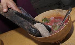 Caldo de piedra